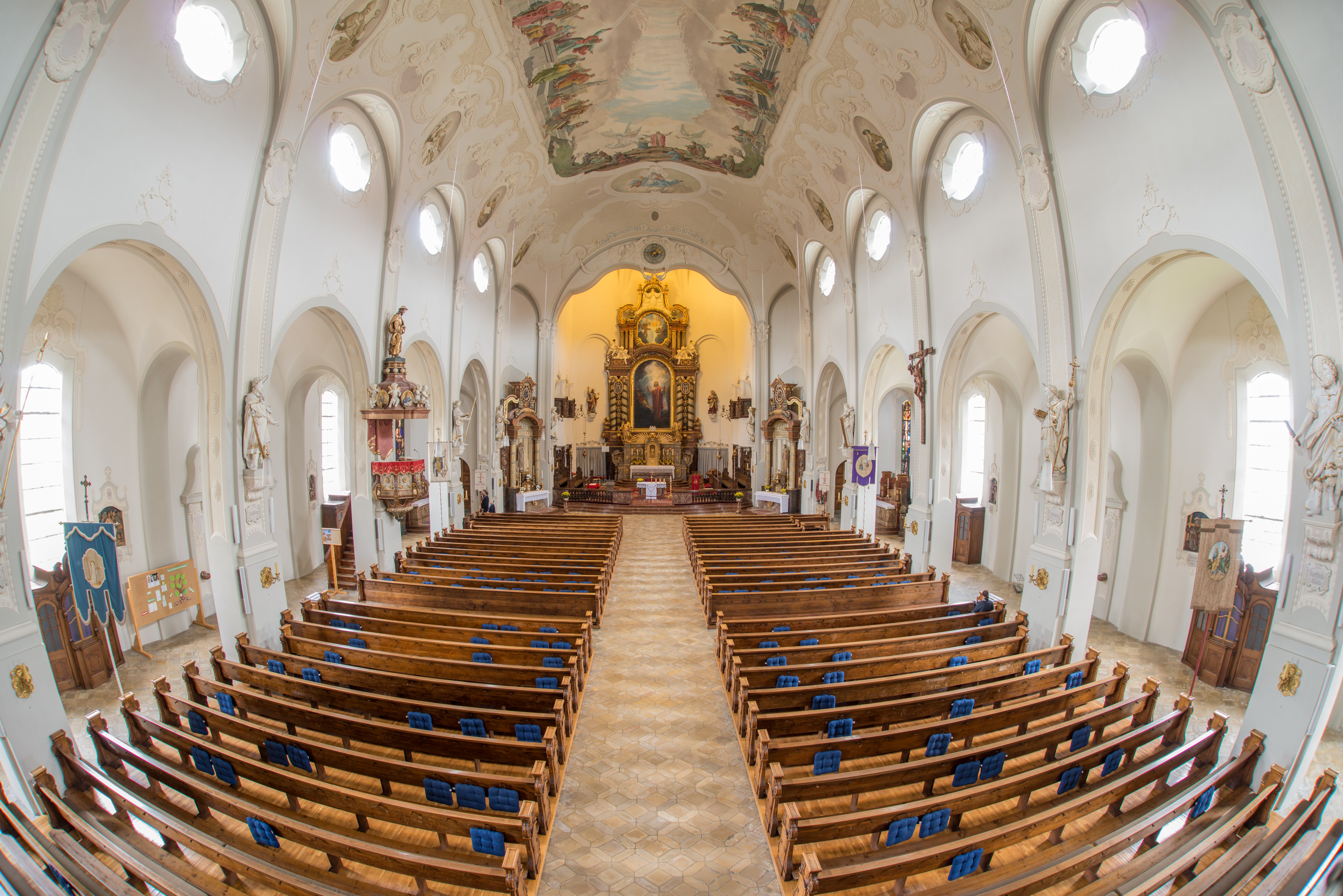 Katholische Stadtpfarrkirche St. Peter und Paul in Lindenberg im Allgäu (Bayern, Deutschland)This is a photograph of an architectural monument.